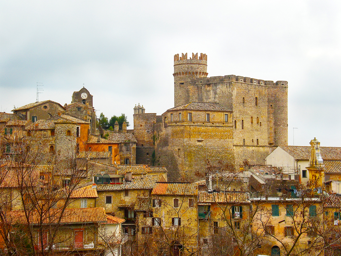 Rocca di Nazzano (Rm), uno dei comuni della Riserva